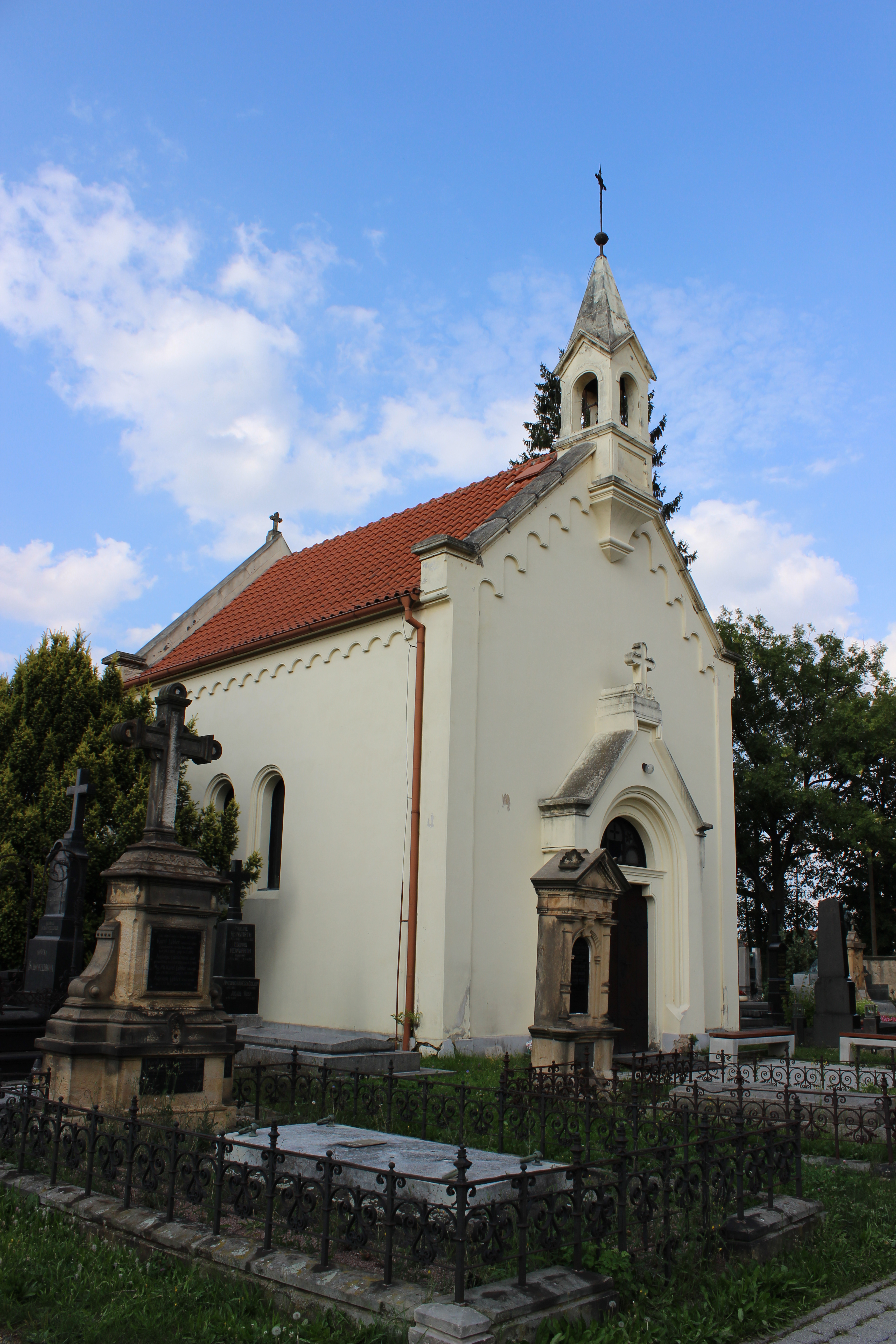 Kaple na hřbitově v Brandýse nad Labem (pohled od jihovýchodu)